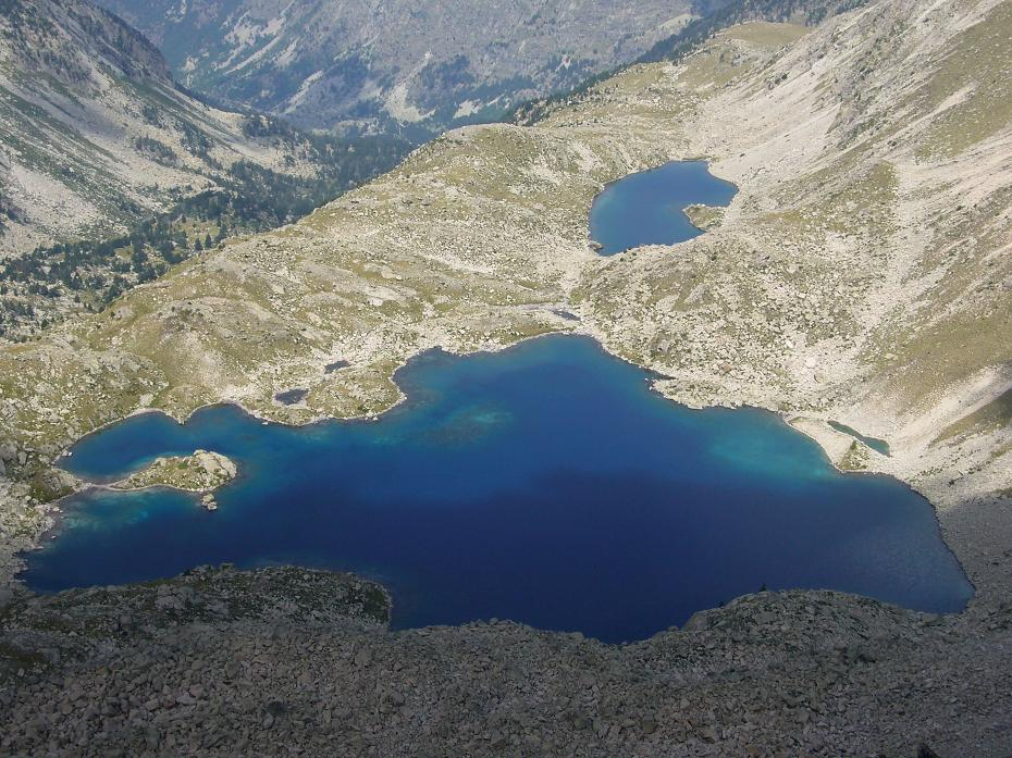 Estanys Major i Xic de Morrano vistos des del Pic de Mariolo; la Vall de Boí, Alta Ribagorça, Catalunya